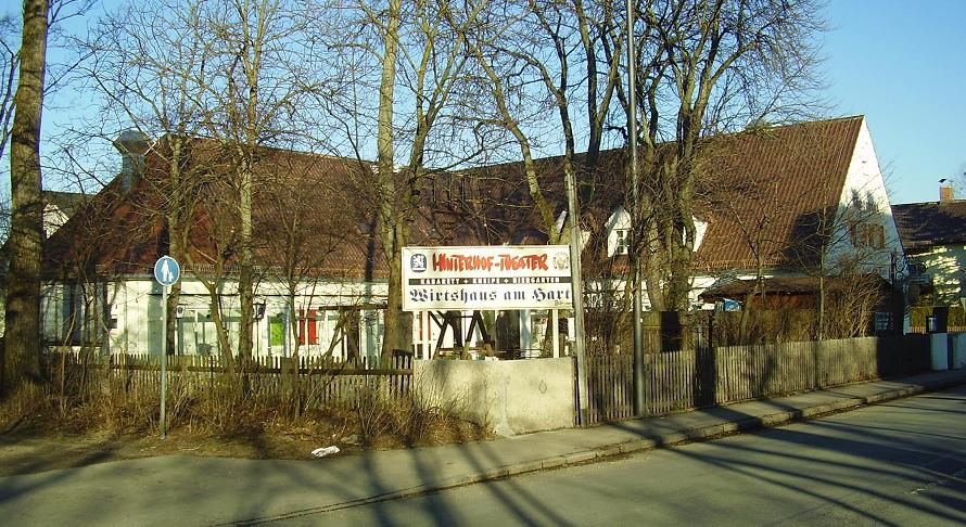 Hinterhoftheater in München (Munich / Germany)